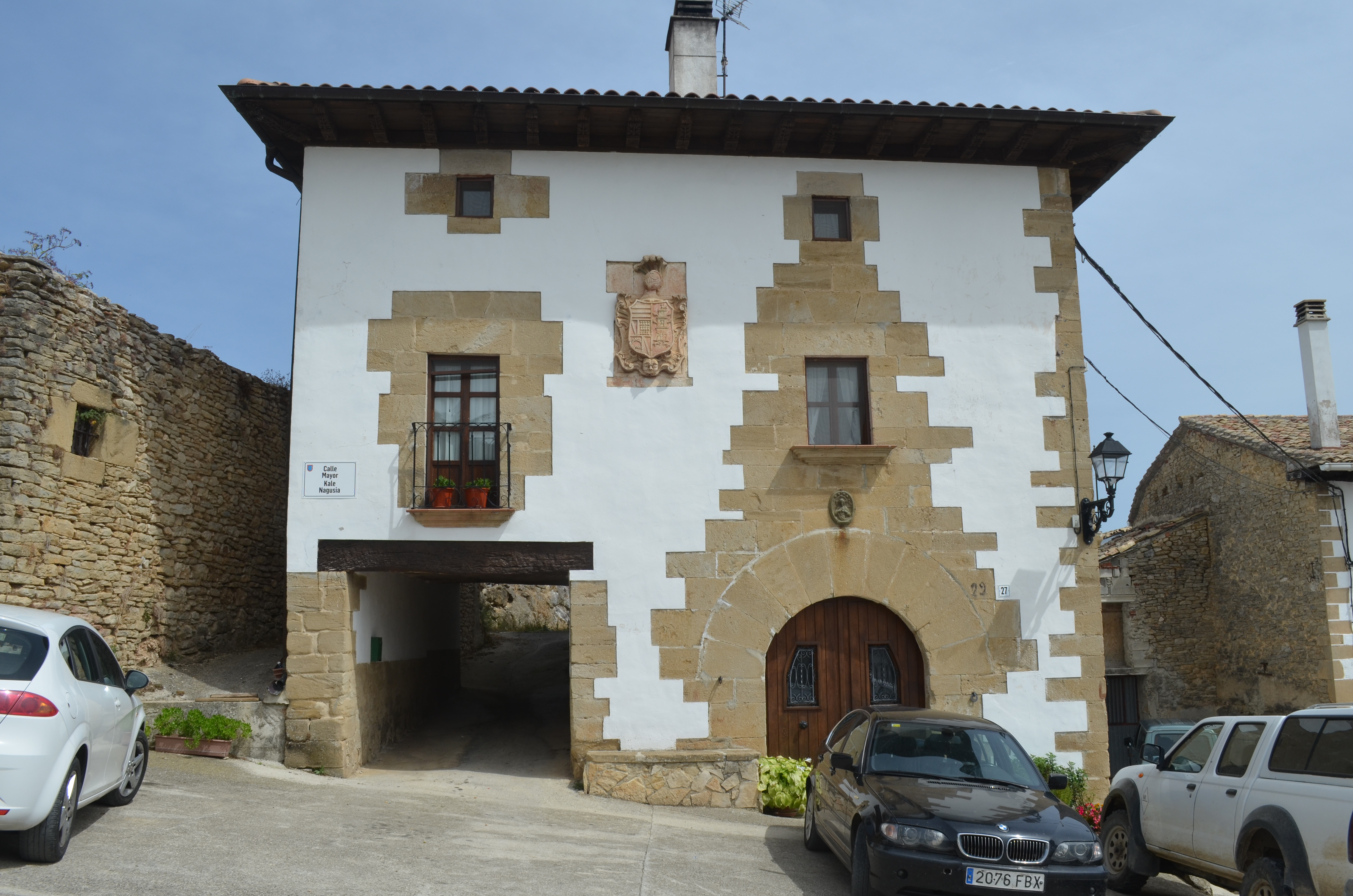 Casa tradicional (Iturgoyen), con escudo "Soy Lácar", de la parte alta del pueblo